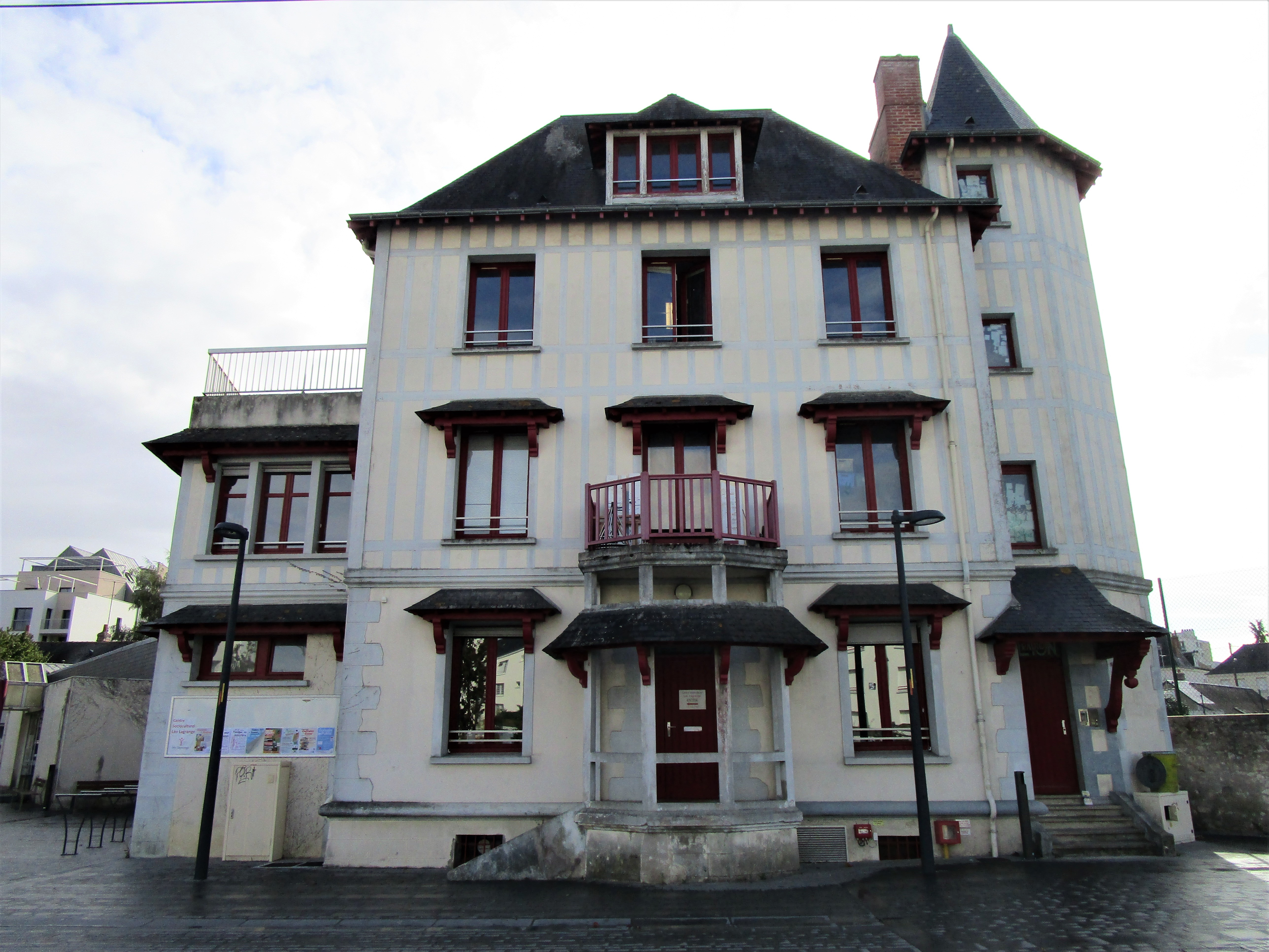 Le centre Léo Lagrange et Radio Béton, sur la rue du Président Kennedy, dans le quartier Saint-Symphorien de Tours